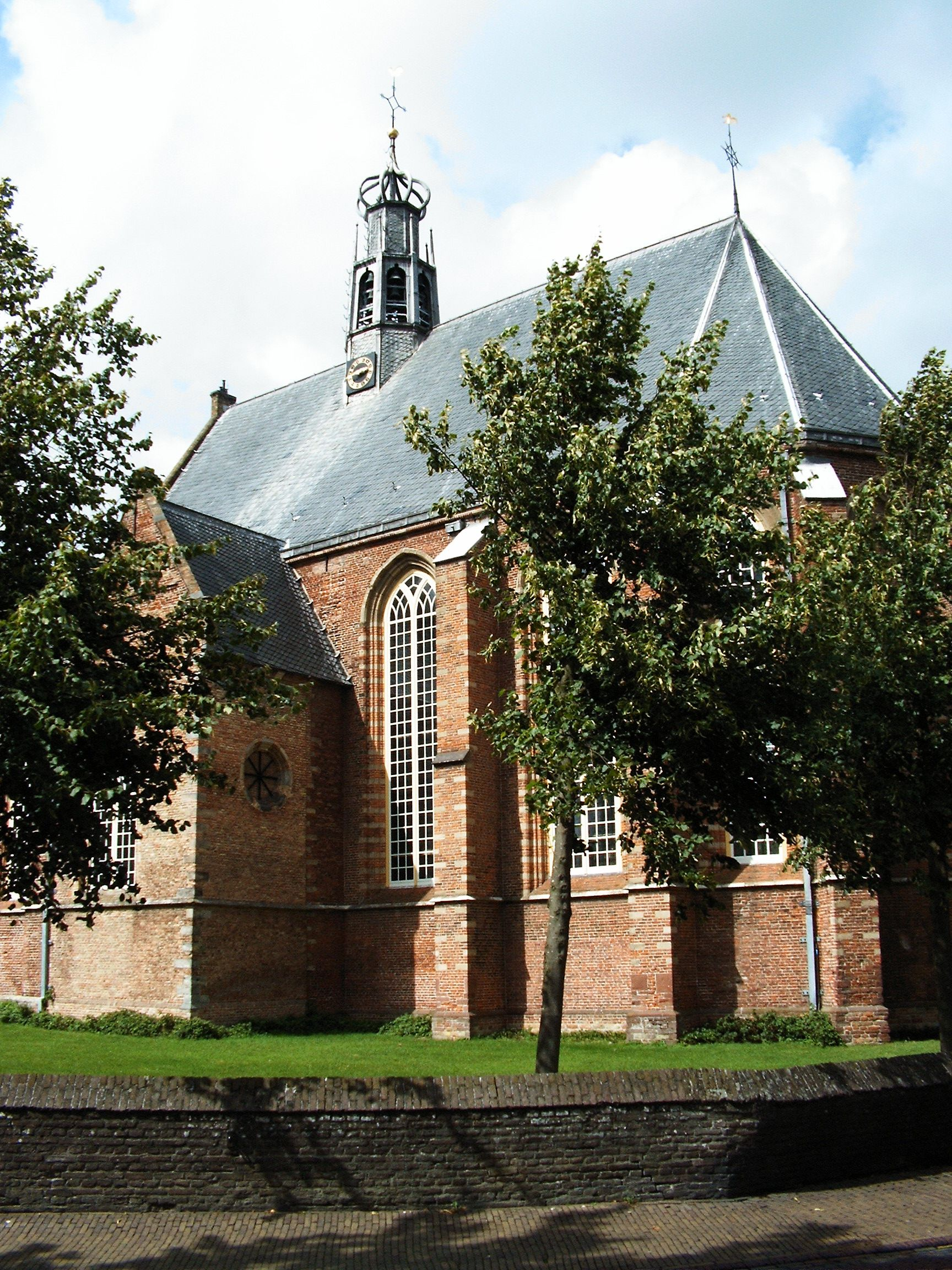 Kirche in Bergen / Nordholland